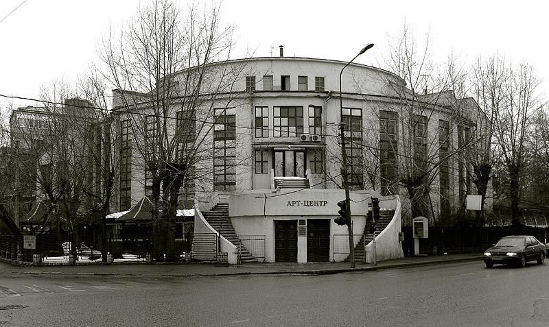 Kauchuk Club in Moscow, by Konstantin Melnikov